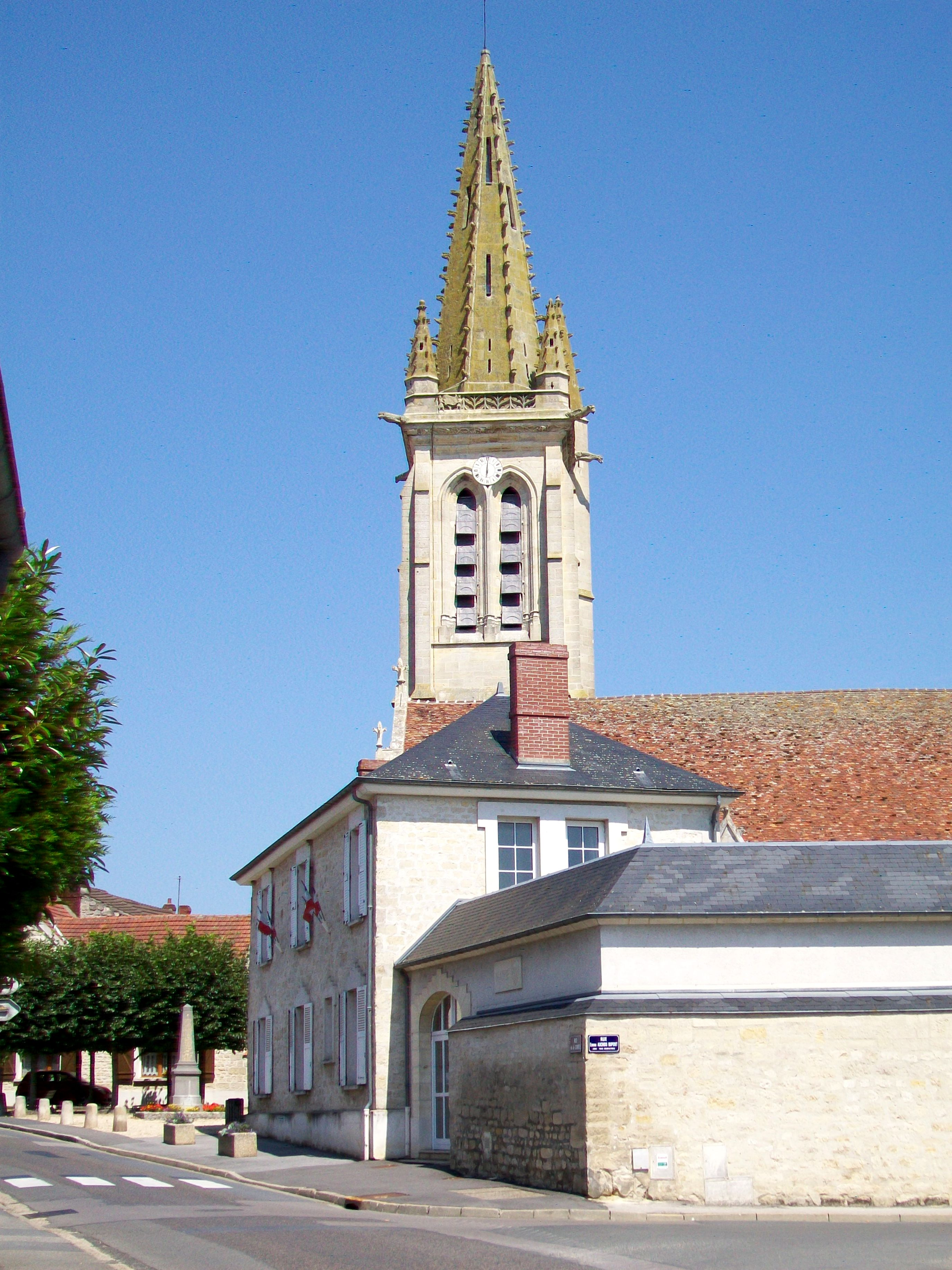 L'église et la mairie (ancien presbytère).